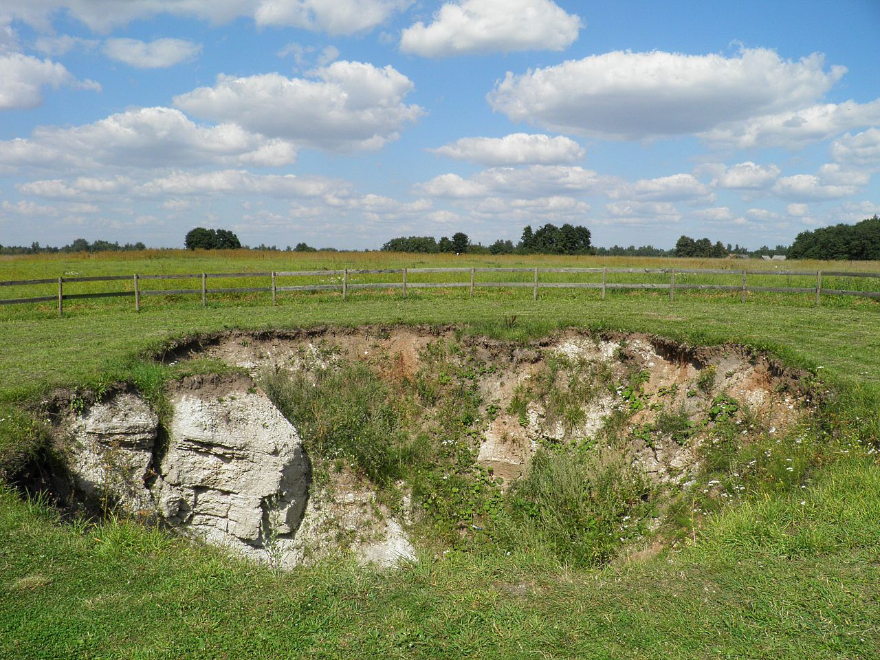 Geologu duobe (2)